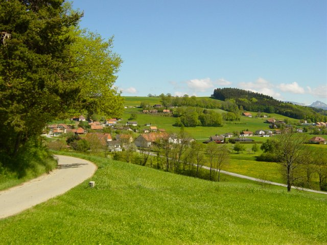 Une vue du village de Vuarmarens depuis la route de chavanne par Meinrad Périsset